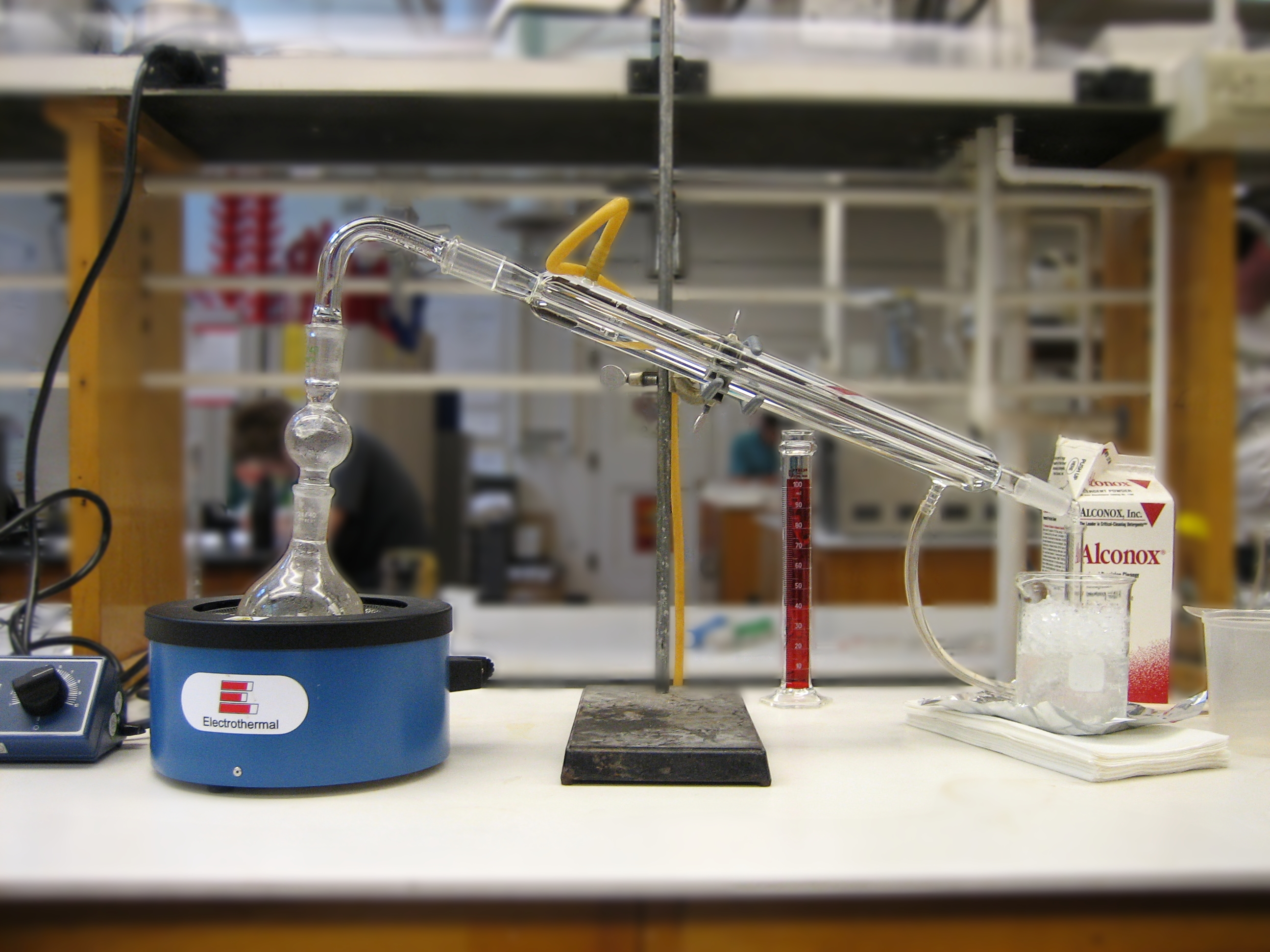 Distillation.